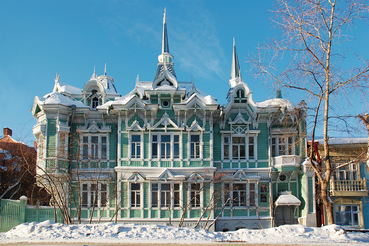 Город Томск, здание по адресу ул. Белинского 19.